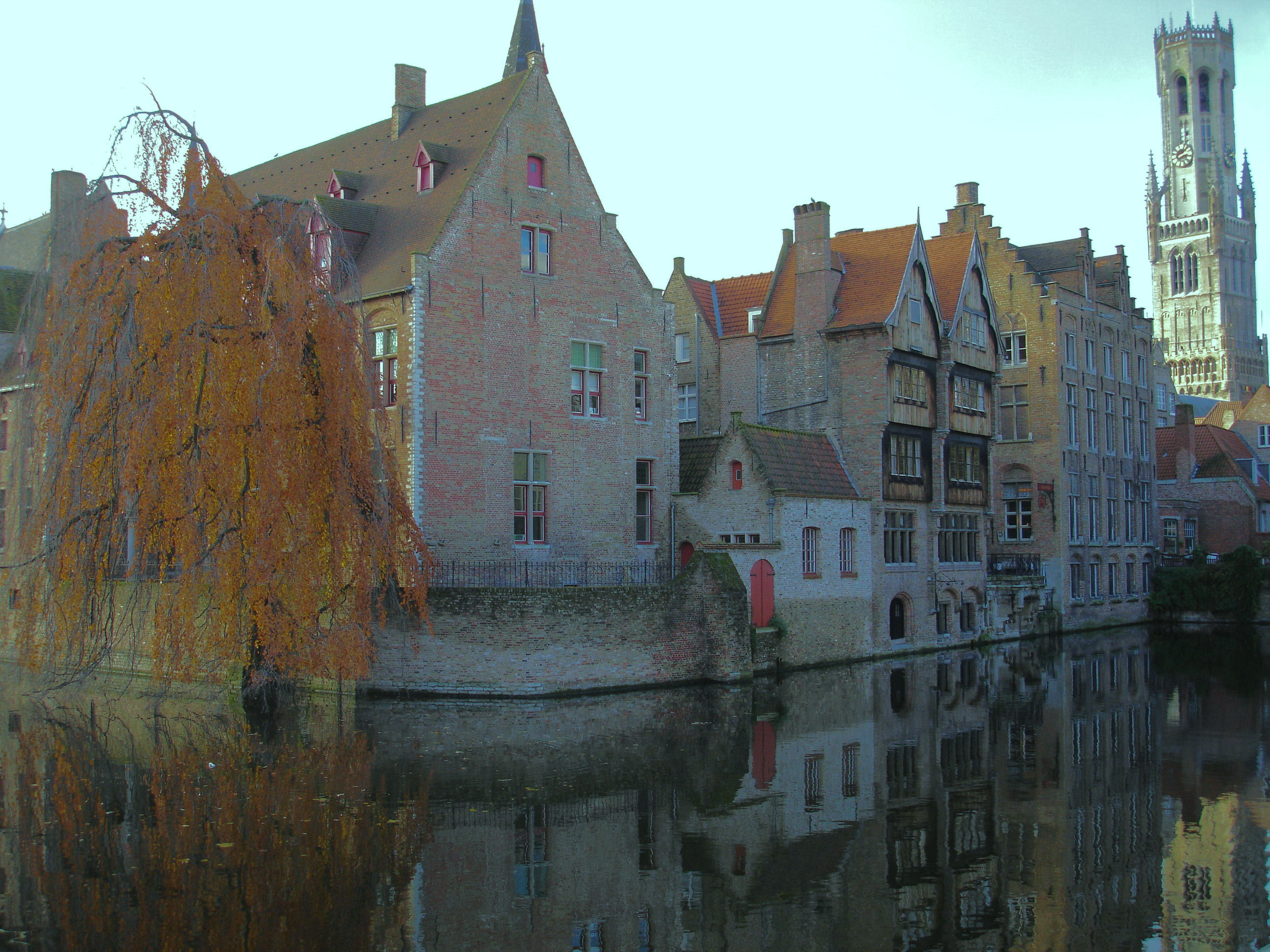 december 2005 Categorie:Afbeelding Brugge